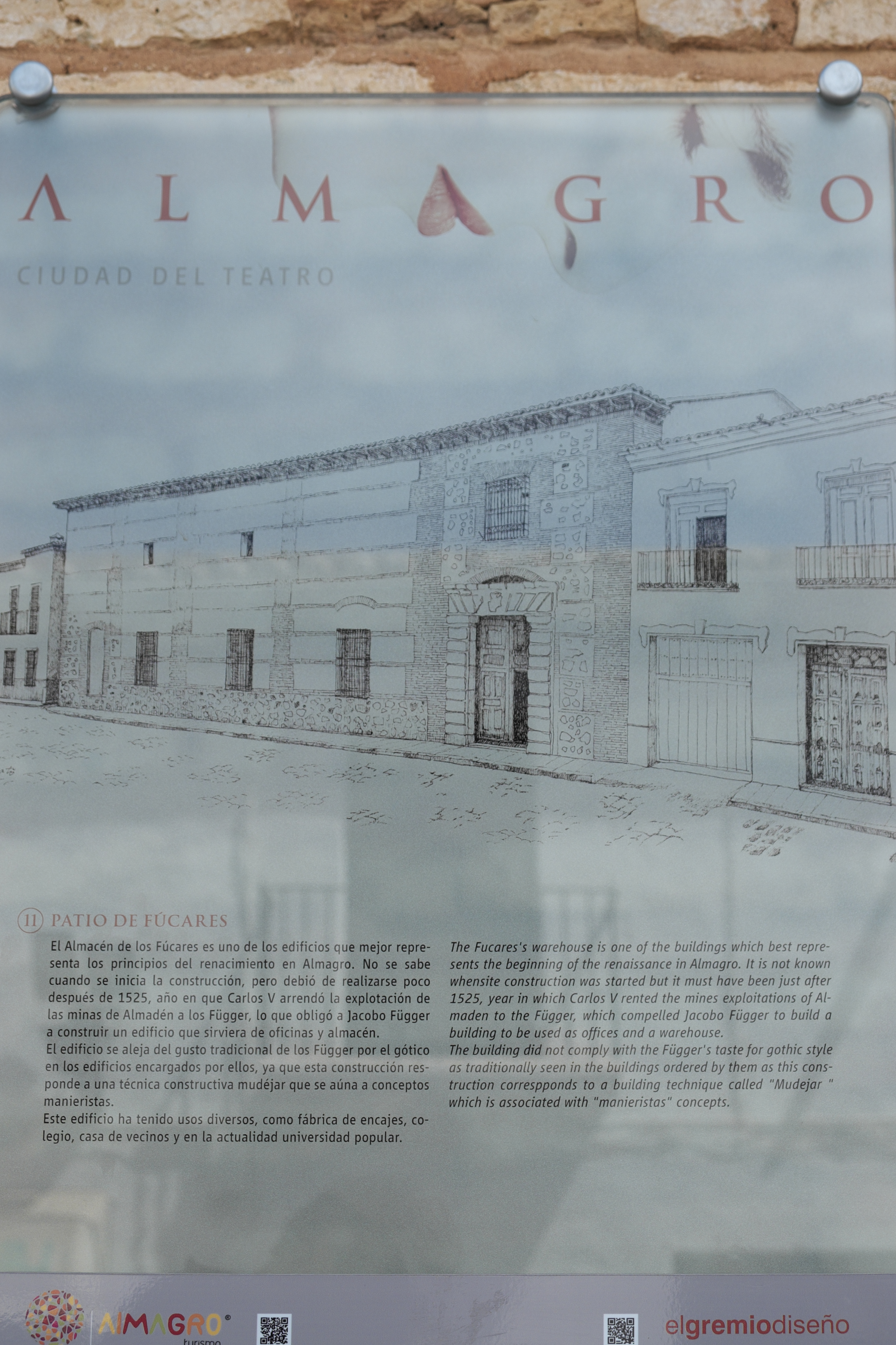 Faktorei der Fugger, Almacén de los Fúcares, in Almagro in der Provinz Ciudad Real (Kastilien-La Mancha/Spanien), Erklärungstafel